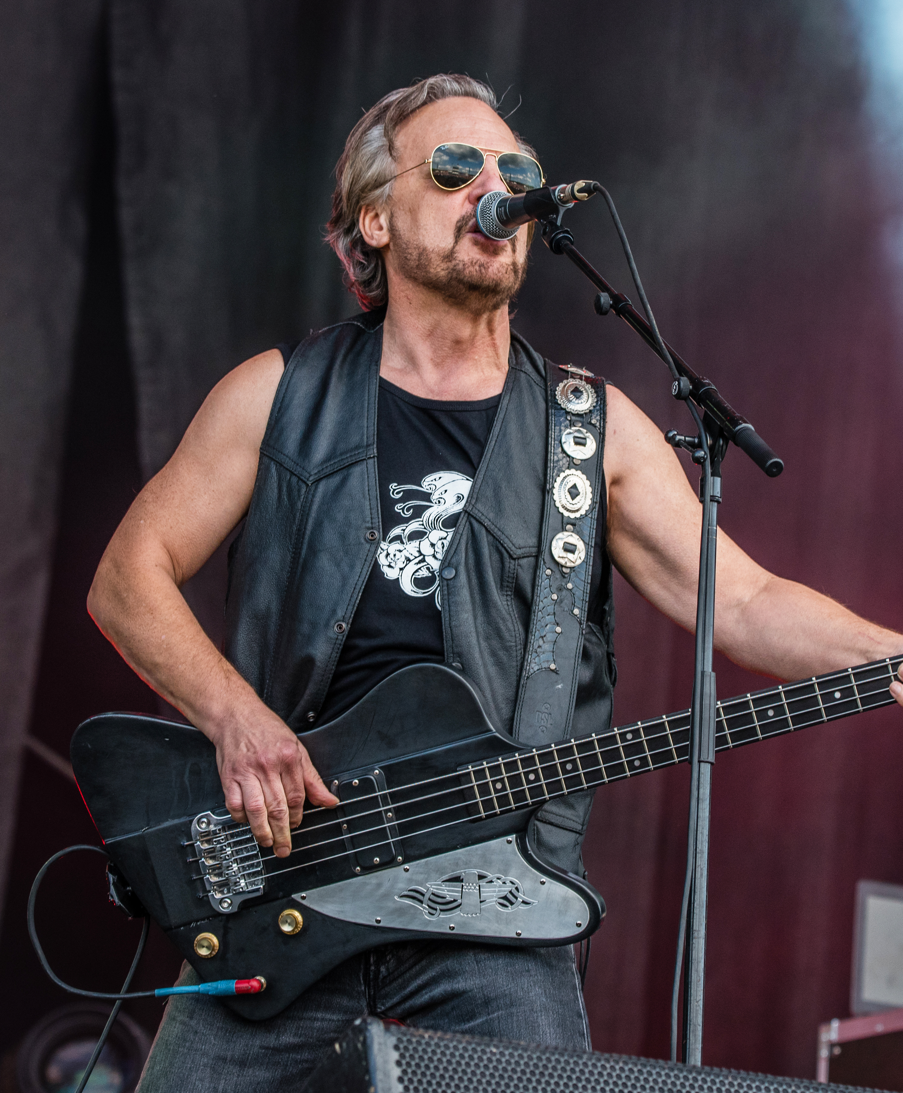 Rose Tattoo beim Werner Rennen 2018